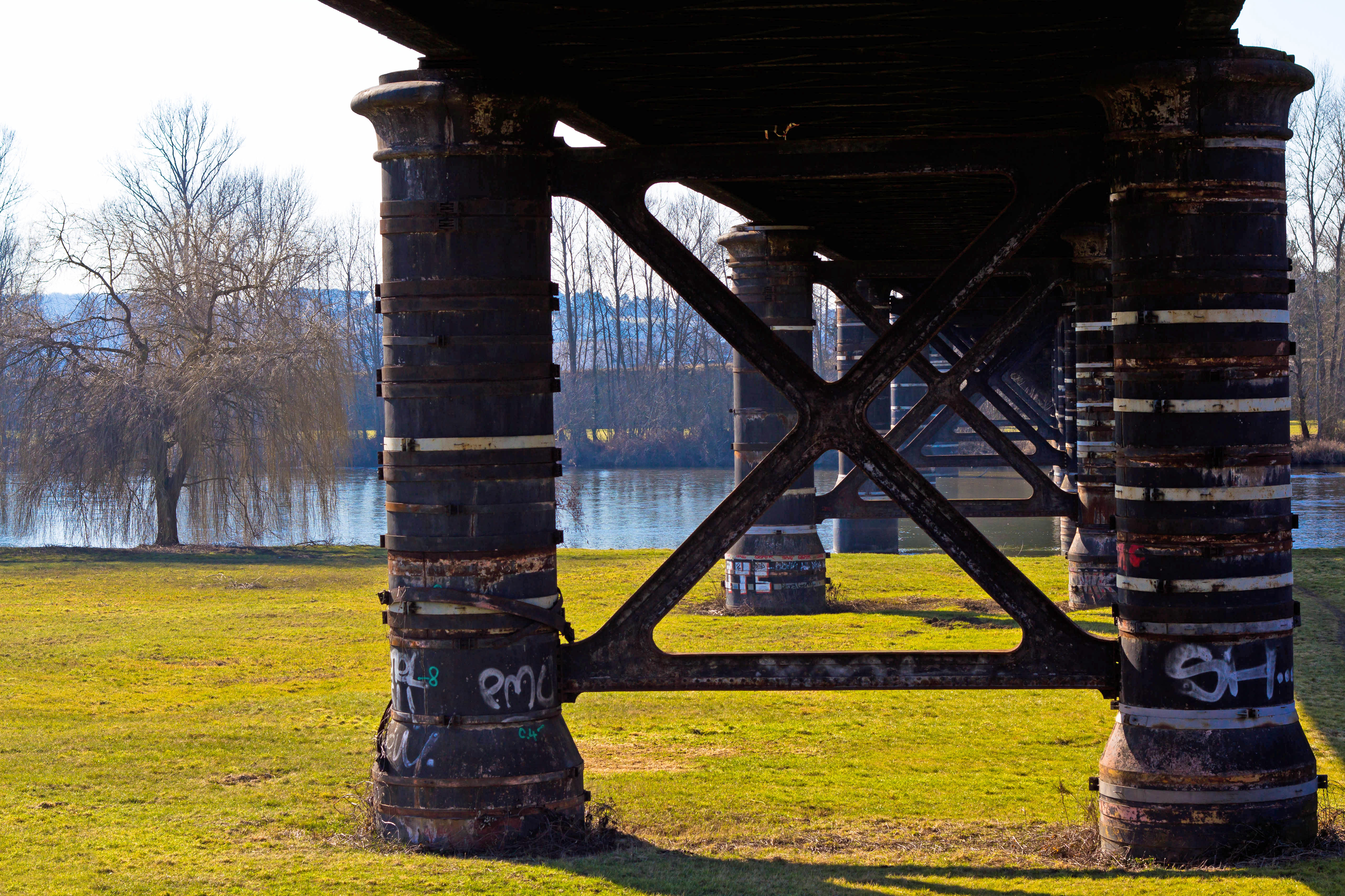 Pont de Fer, Moulins sur Allier, 03000